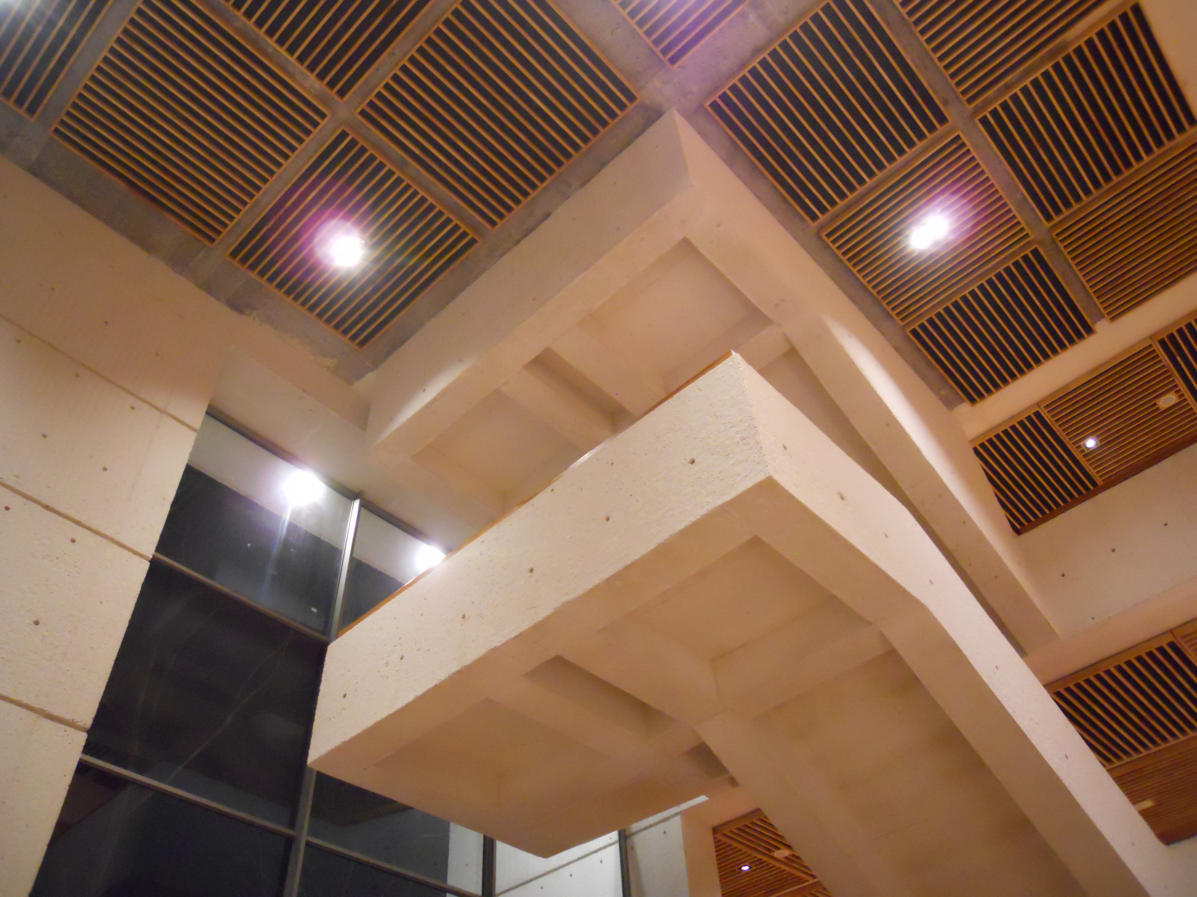 Escaleras en el interior de la biblioteca JSM en Suba.